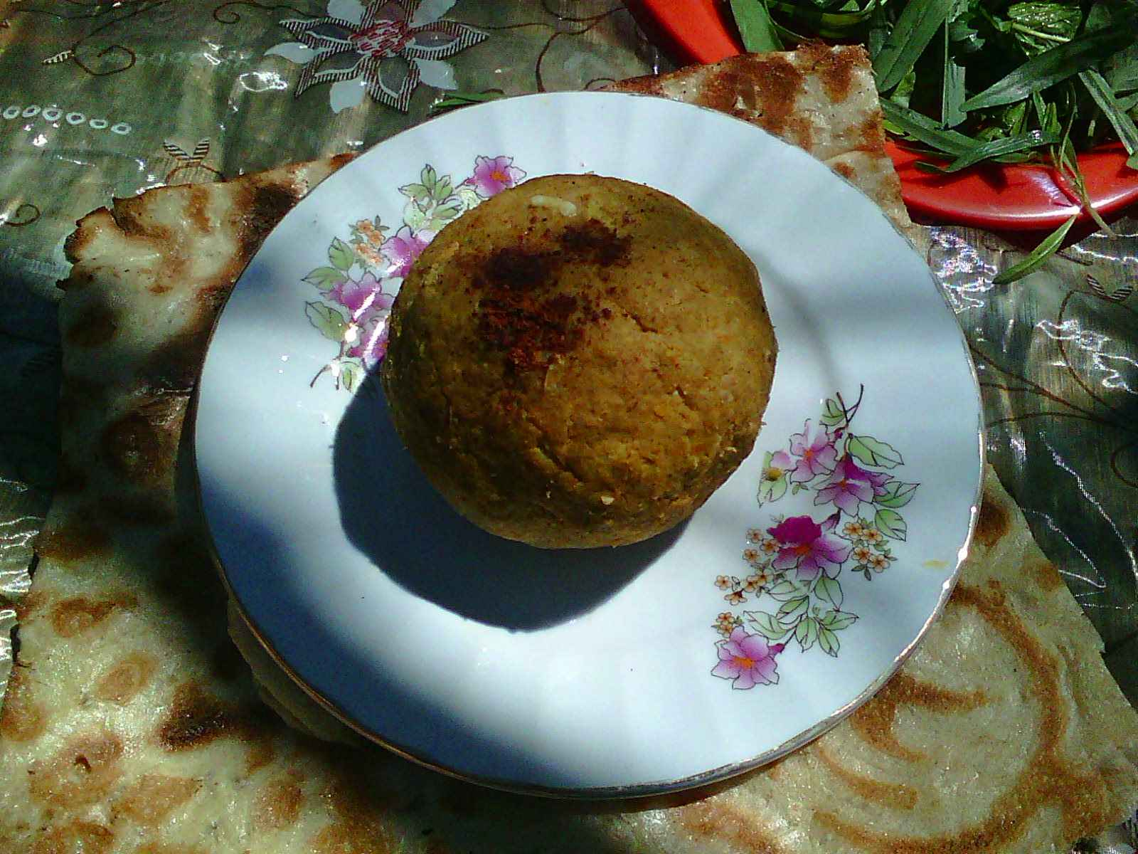 کوفته سیزده بدر بهار This photo has been taken in the country: Iran